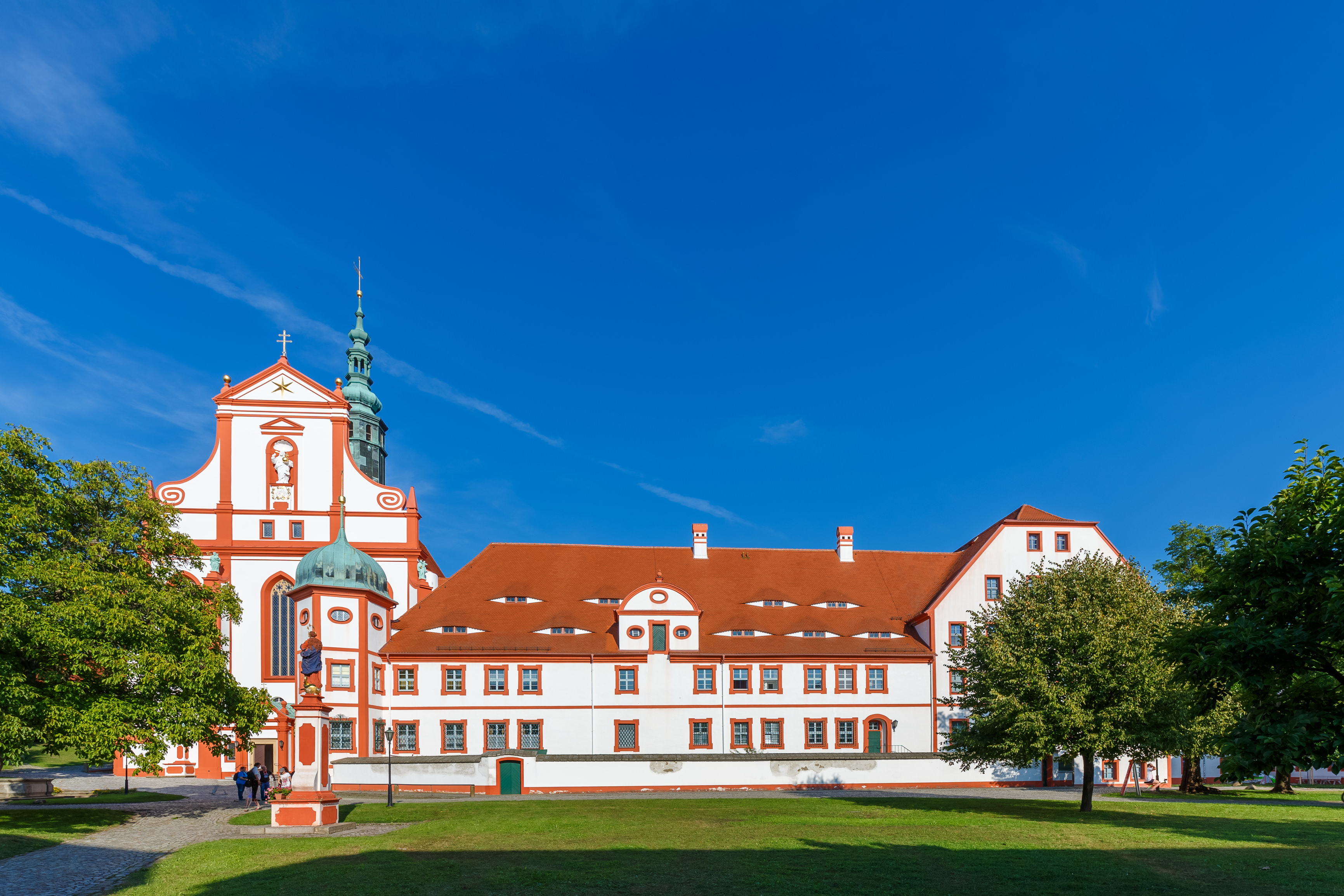 Das Kloster Sankt Marienstern (obersorbisch Klóšter Marijina Hwězda) ist eine Zisterzienserinnen-Abtei und liegt am Klosterwasser in Panschwitz-Kuckau in der sächsischen Oberlausitz. Hornjoserbsce: Klóšter Marijina hwězda w Pančicach-Kukowje.